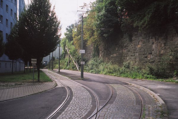 Wendeschleife der Straßenbahn Kassel in der Ottostraße/unter dem Polizeirevier. Oberhalb de Stützmauer rechts befindet sich der Hauptbahnhof